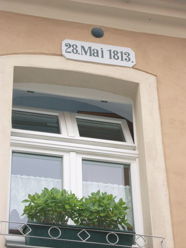 Kanonenkugel in der Hauswand : Lange Straße 4, Hoyerswerda